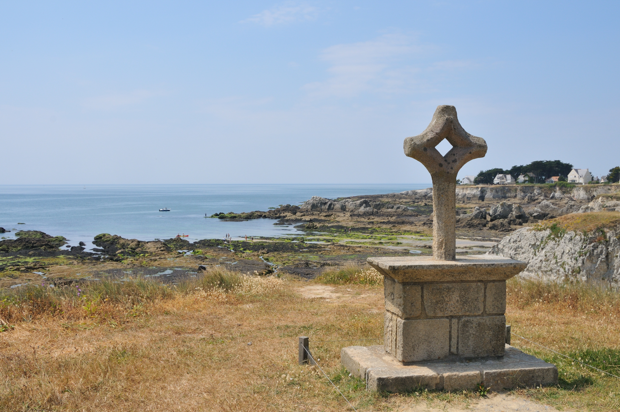 Grande Côte, Le Pouliguen, Loire-Atlantique, France